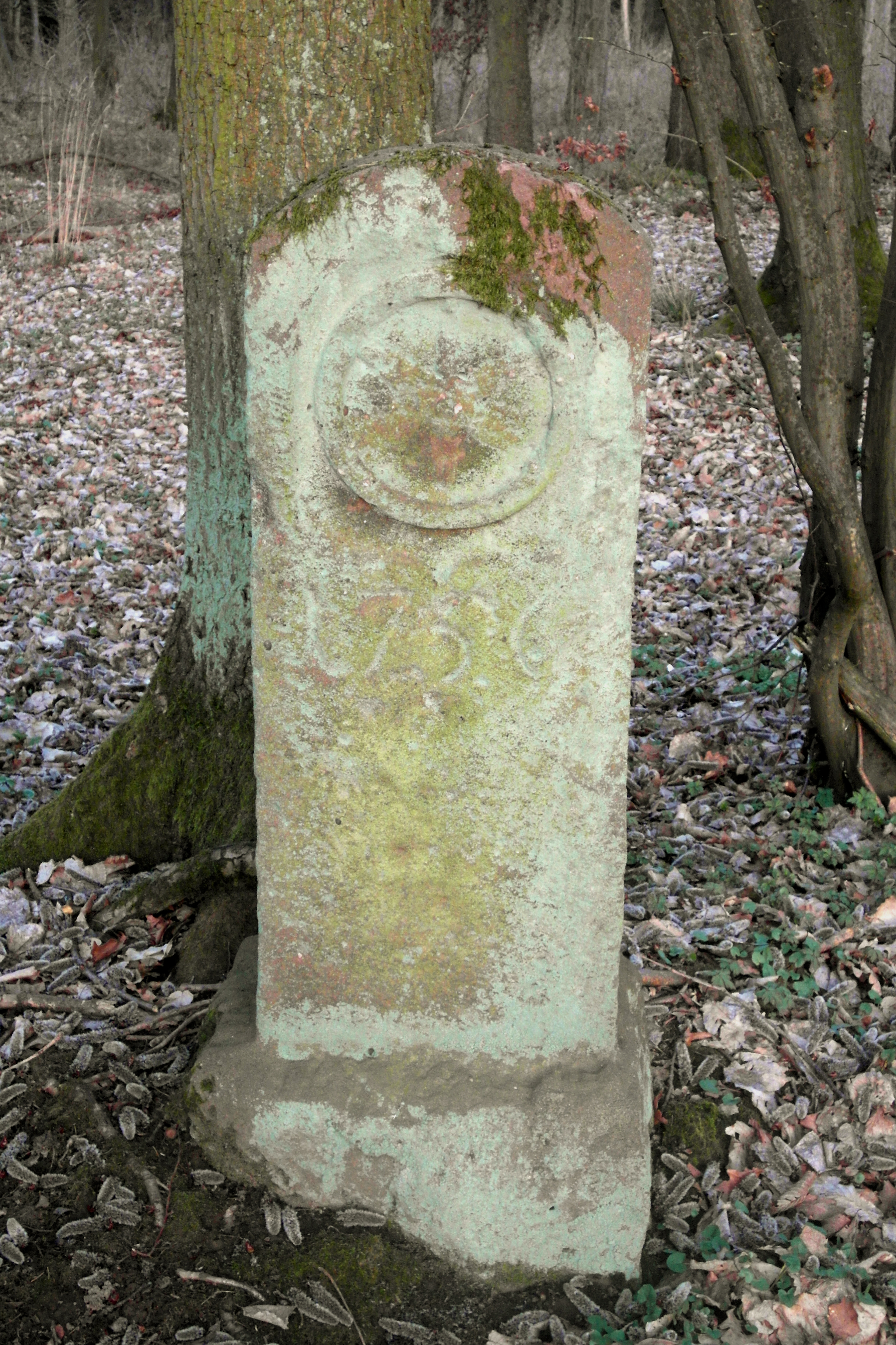 Grenzstein von 1756 mit Mainzer Rad (und hessischem Löwen)